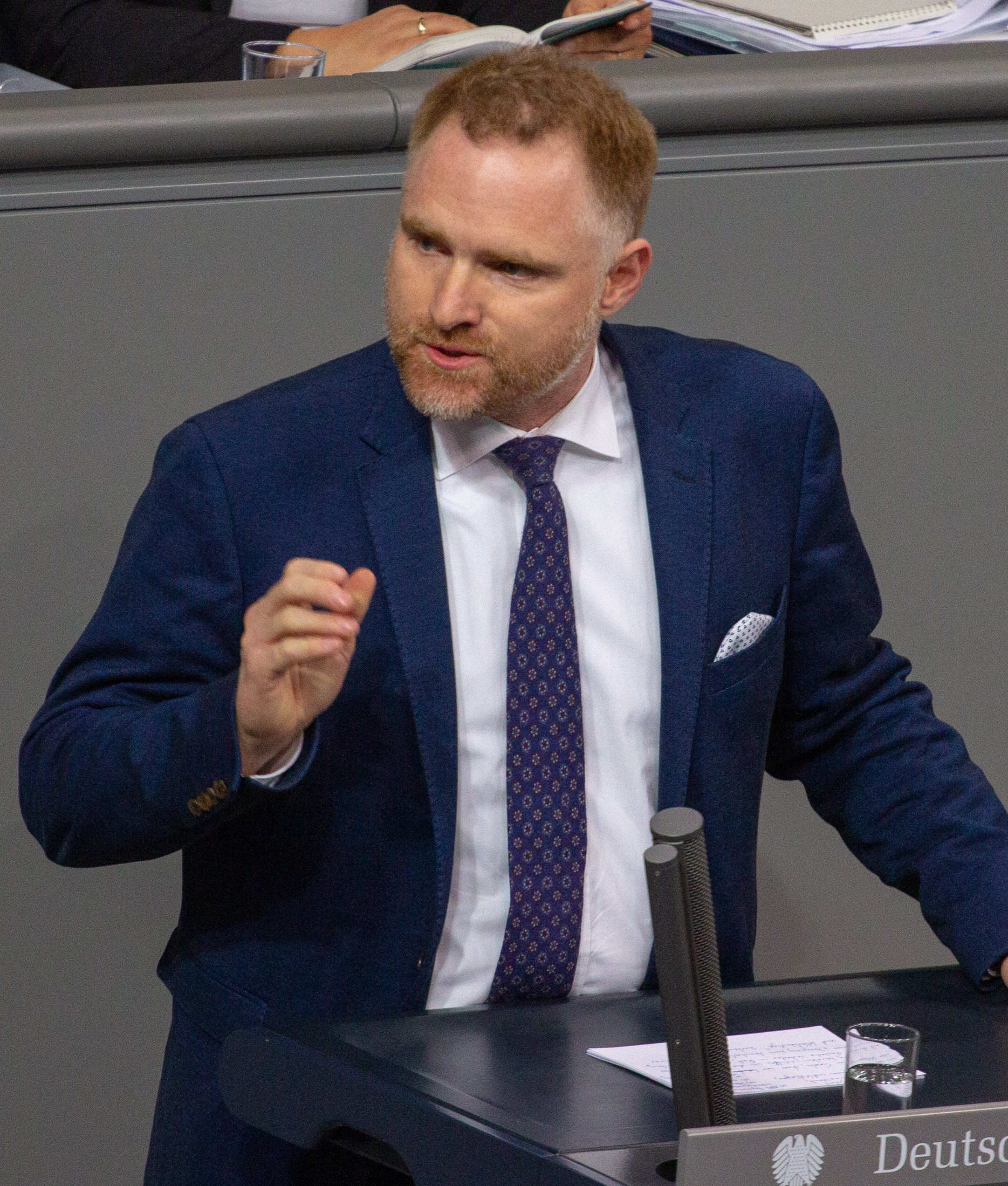 Peter Aumer, Mitglied des Deutschen Bundestages, während einer Plenarsitzung am 11. April 2019 in Berlin.